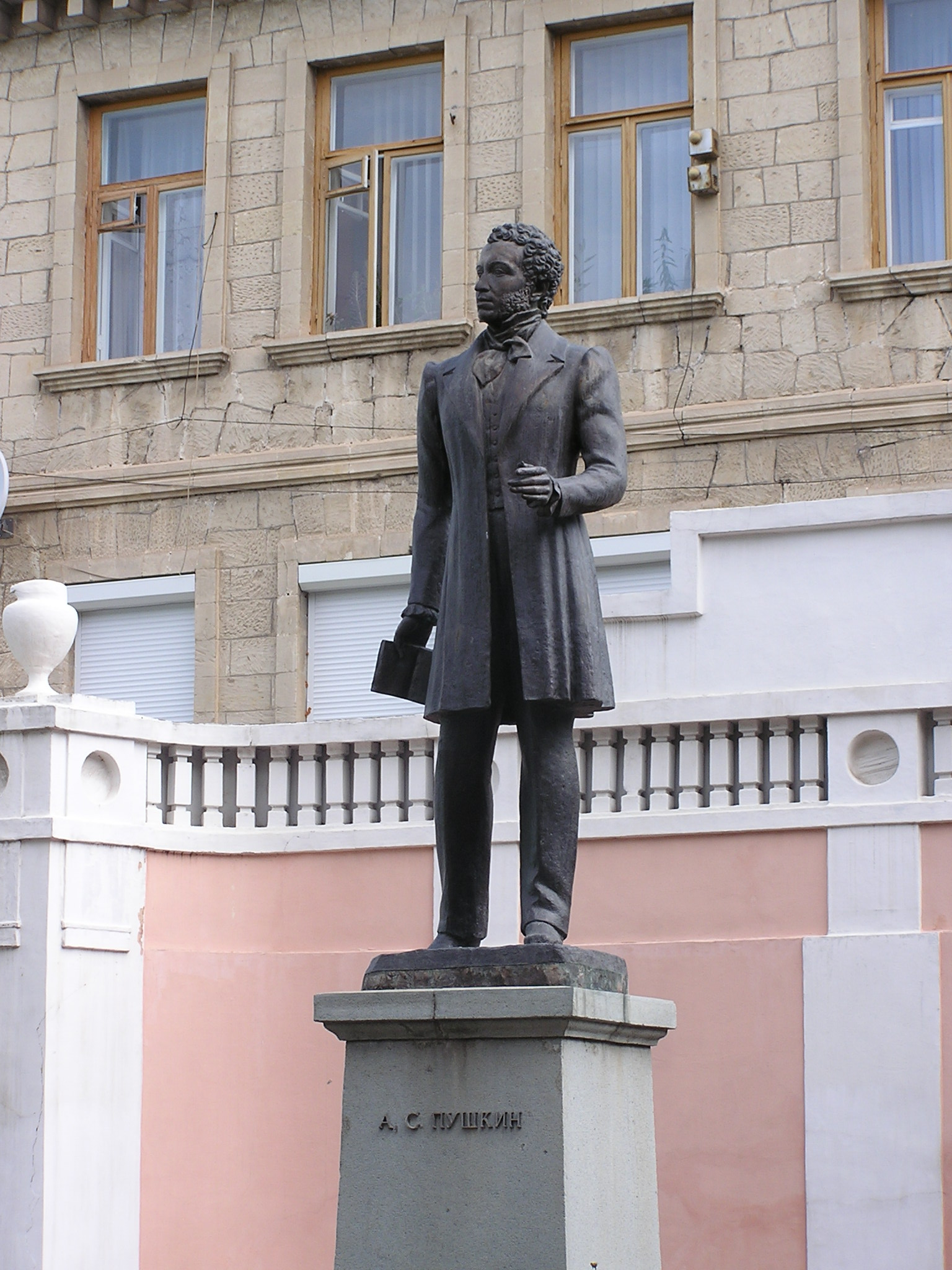 Бахчисарай.